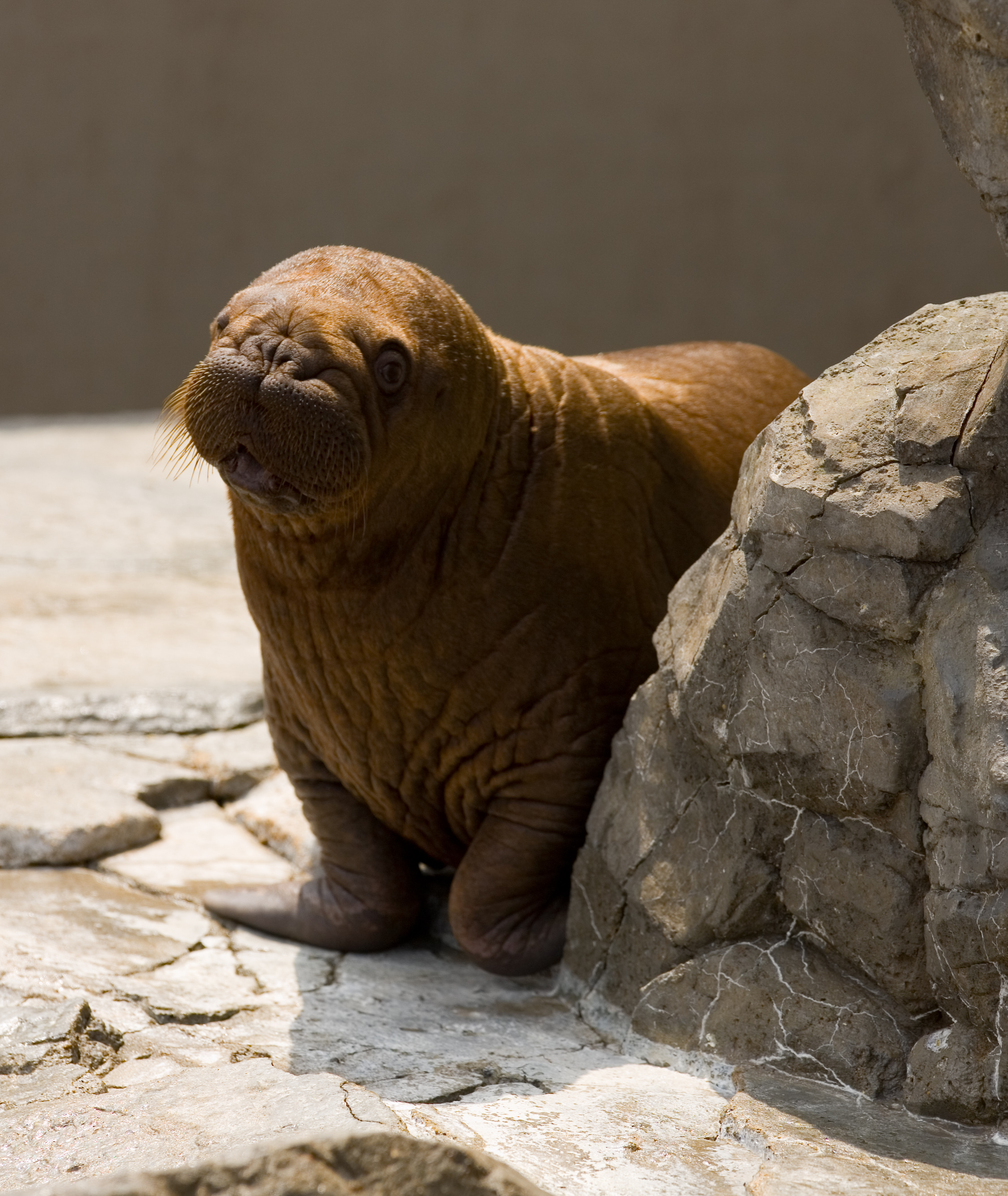 Walrus pup at Kamogawa Seaworld, Japan